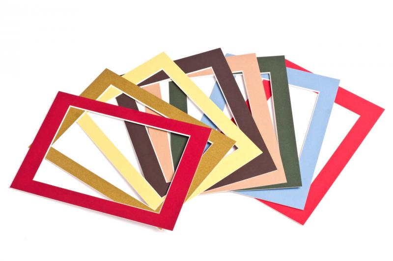 Passepartout